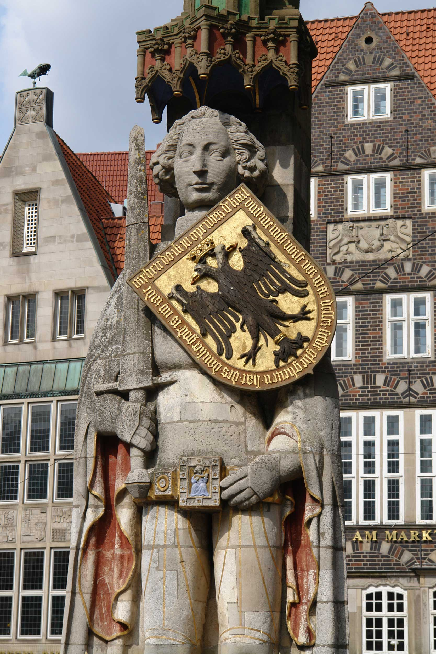 Detail:Roland auf dem Marktplatz in Bremen. Mit dem Bremer Rathaus Teil des Weltkulturerbe Das abgebildete Objekt ist ein geschütztes Kulturdenkmal in der Freien Hansestadt Bremen, mit der Nr. 0067 beim Landesamt für Denkmalpflege registriert.